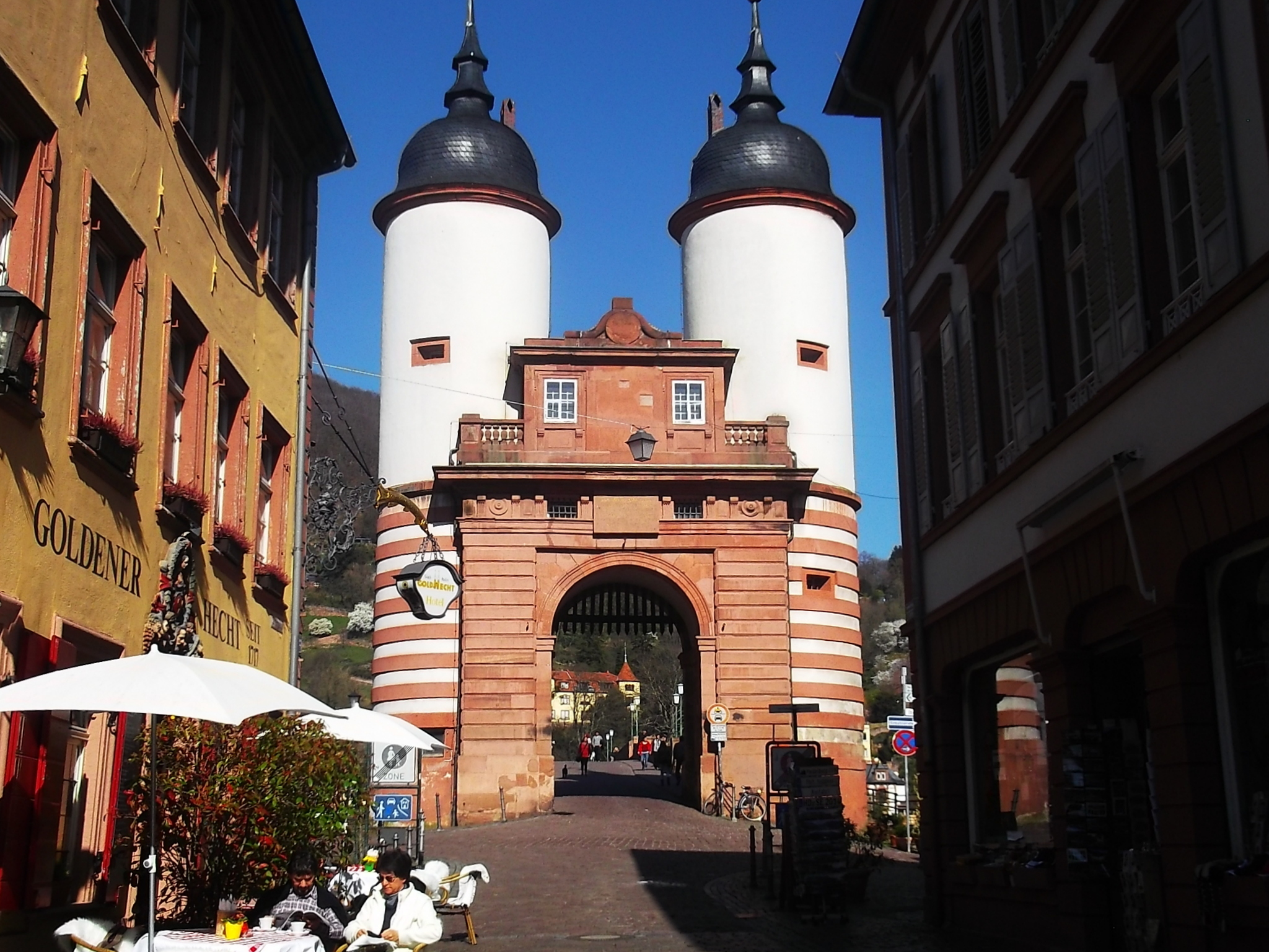 Esta situado en heidelberg como dicho nombre, una de las ciudades más conocidas de toda alemania!. Al final de la puente Carl-Theodor-Brücke lo mismo que (puente de Carlos Teodoro) se encuetra la puerta o reja del puente con un color destacable y historico se quedo en mejor estado.